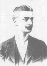 Huszka Jenő magyar zeneszerző